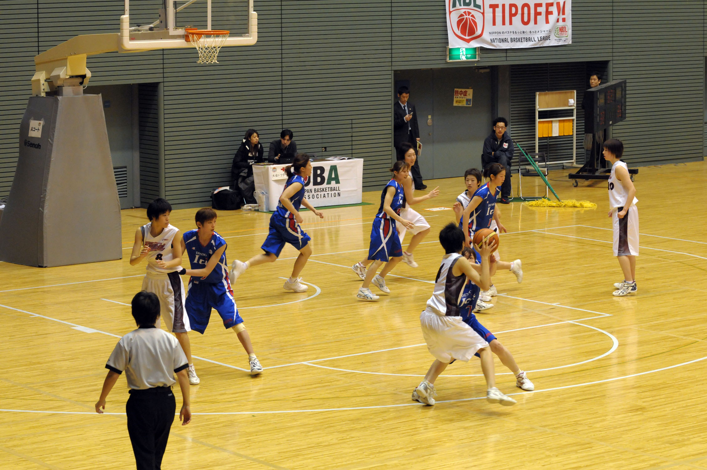 2013年全日本総合バスケットボール選手権大会2回戦、大阪薫英女学院高等学校対デンソーアイリス。駒沢体育館で。